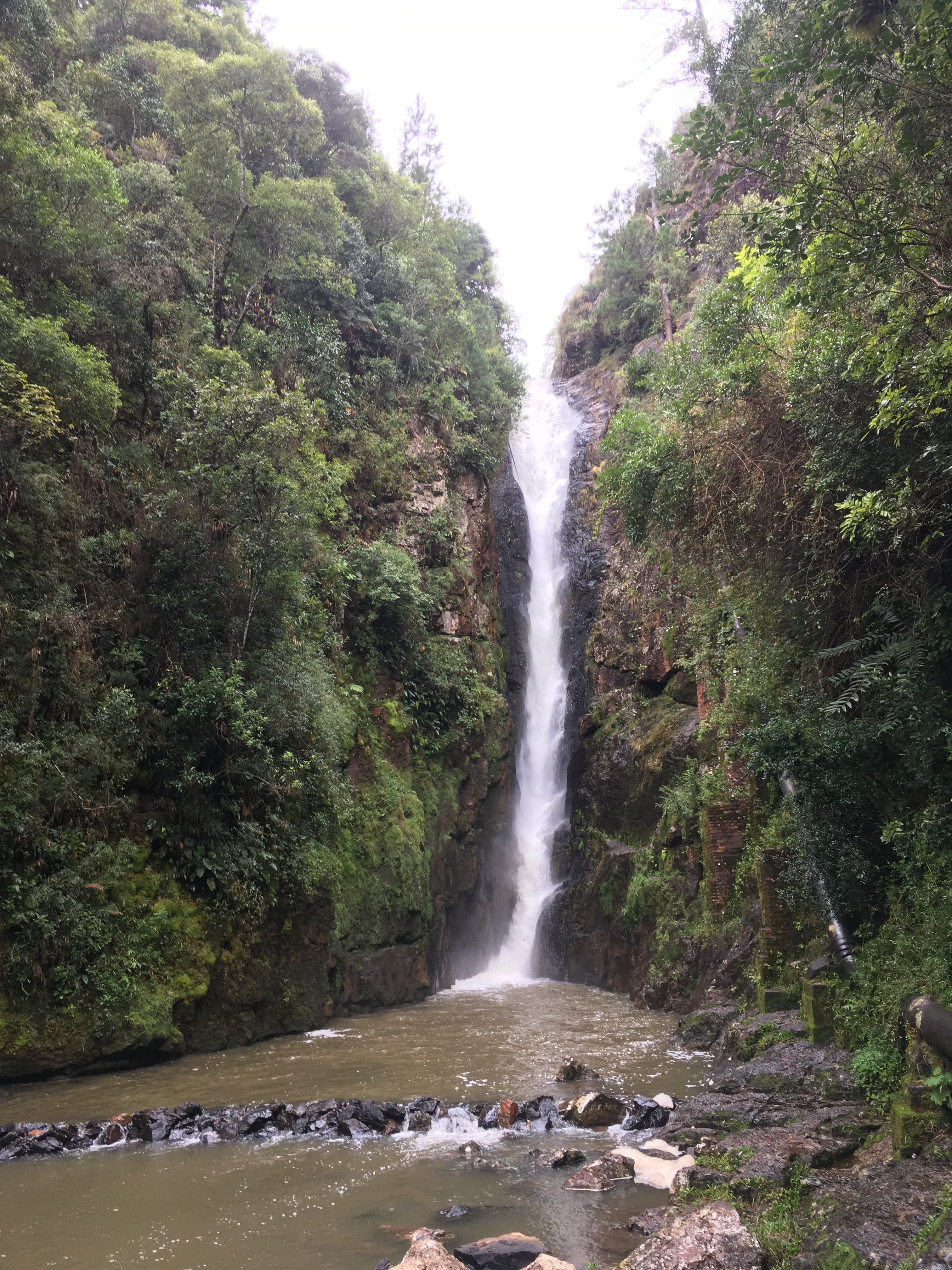 Cascata Paraiso, Campo Alegre, Santa Catarina